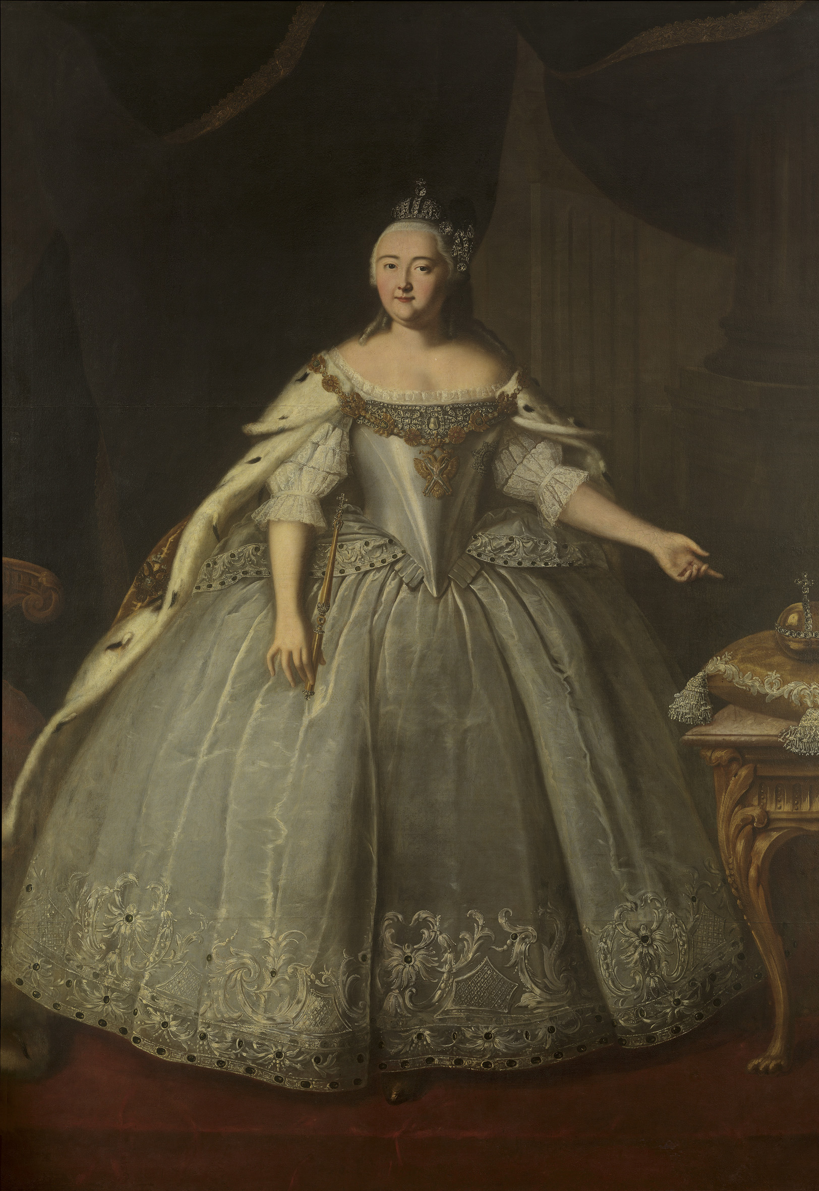 Портрет написан И.Я.Вишняковым с соблюдением всех канонов парадного портрета – большой формат, монументальная статичная композиция, последовательное и тщательное изображение всех царских регалий, акцентирование высокого социального статуса модели. Художественные вкусы середины XVIII столетия и, в частности, формирующийся в русском искусстве стиль рококо оказали заметное влияние на устоявшиеся формы императорского портрета. Фигура и жест Елизаветы Петровны претендуют на легкость и изящество. В моду входит менее громоздкий и тяжелый, чем в начале столетия, наряд. На лице императрицы кокетливая улыбка, говорящая о добродушии и веселом нраве "любящей смехи и забавы" Елизаветы.